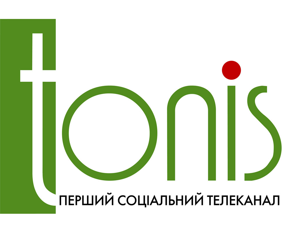 Логотип украинский телеканала Tonis